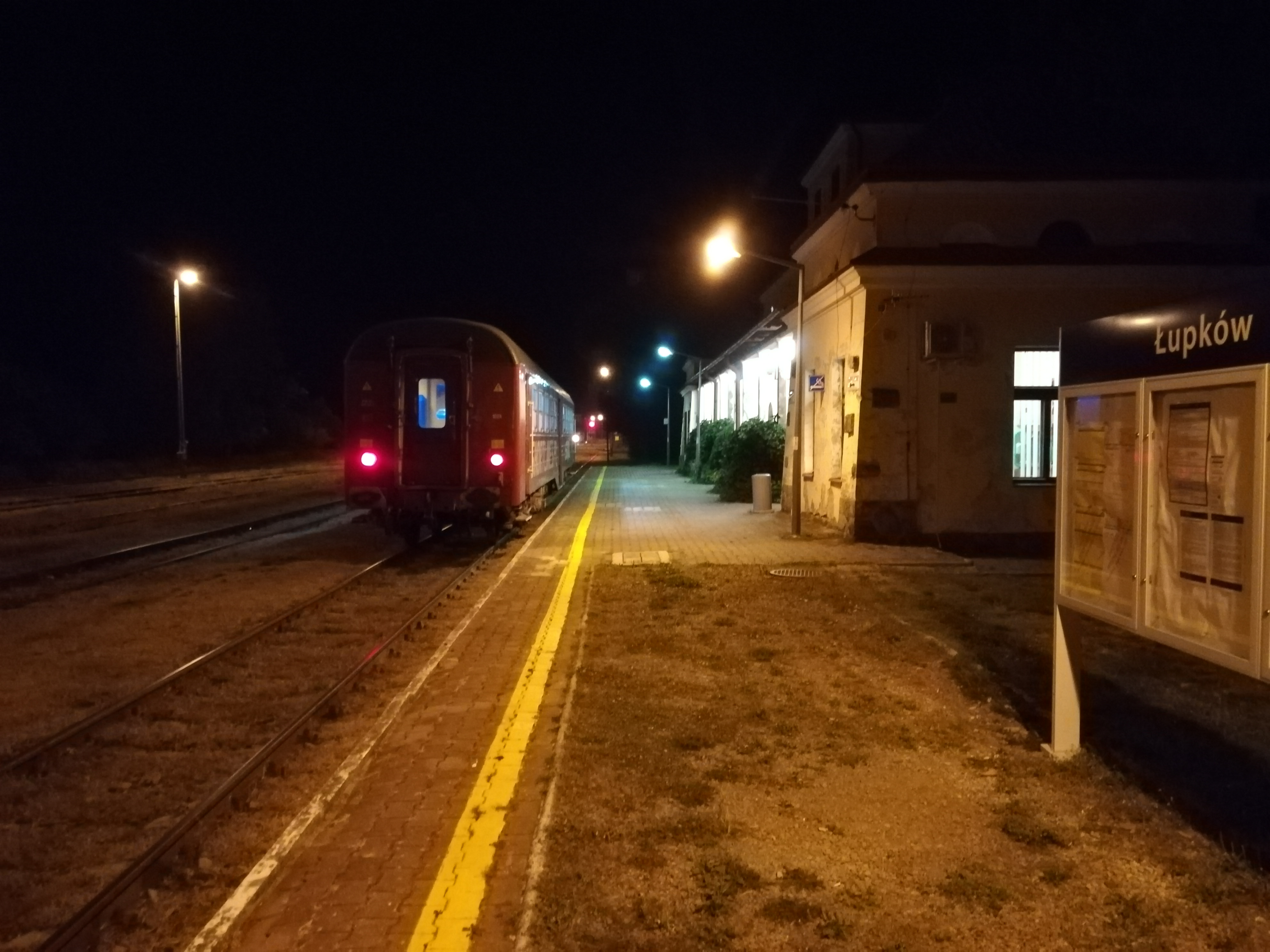 Stacja PKP ŁUPKÓW w nocy